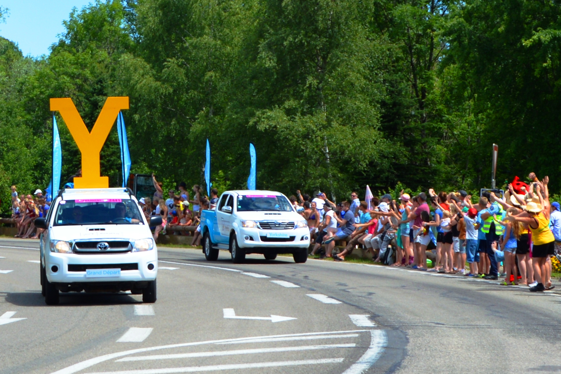 Publicité de la Caravane du Tour de France pour la région du Yorkshire. Le Royaume-Uni a accueilli un grand départ du Tour de France 2014. Le peloton s'élanca dans la région du Yorkshire, de la ville de Leeds. Photo prise sur la D27 près du Lac de Chalain (Jura) pendant l' Etape 11 du Tour de France 2014.